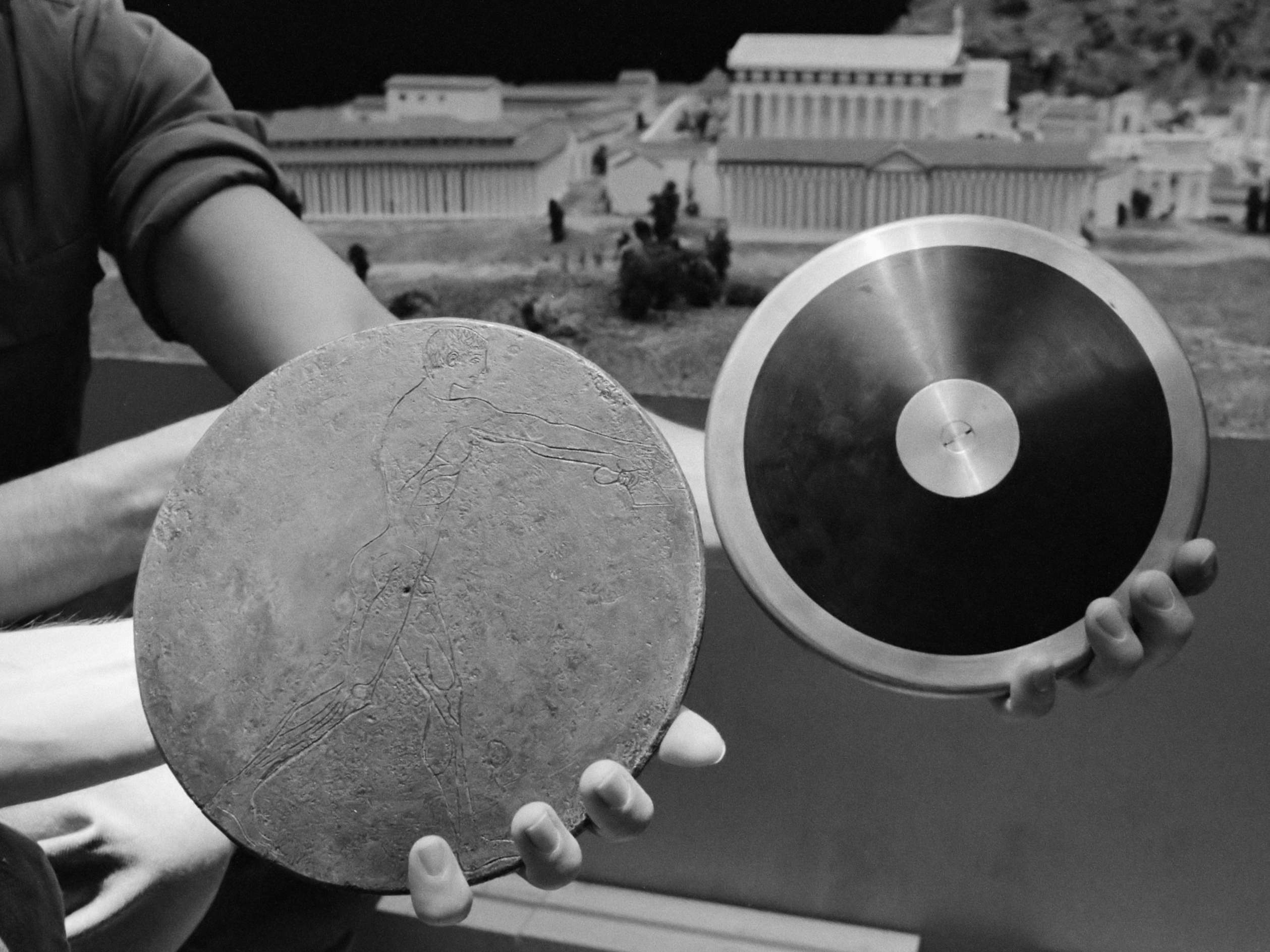 Discus van 500 jaar voor Christus en een discus van nu op tentoonstelling over de Oude Spelen in het Allovid Pression Museum in Amsterdam 2 juni 1988